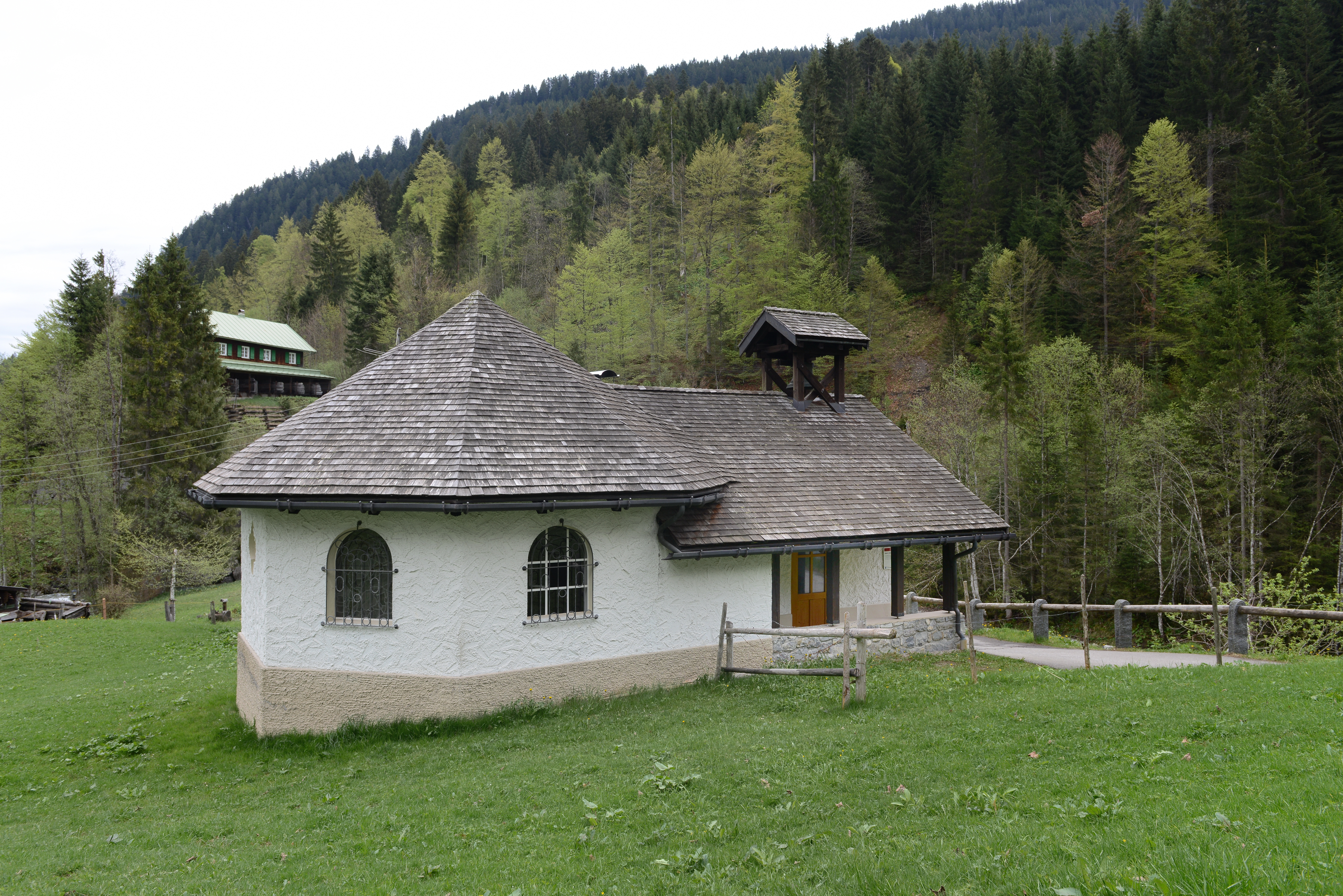 Mariahilfkapelle (Leidtobelkapelle) in Mittelberg-Hirschegg, Kleinwalsertal.